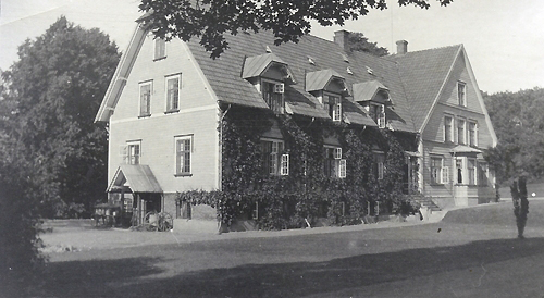 Sannarp manor